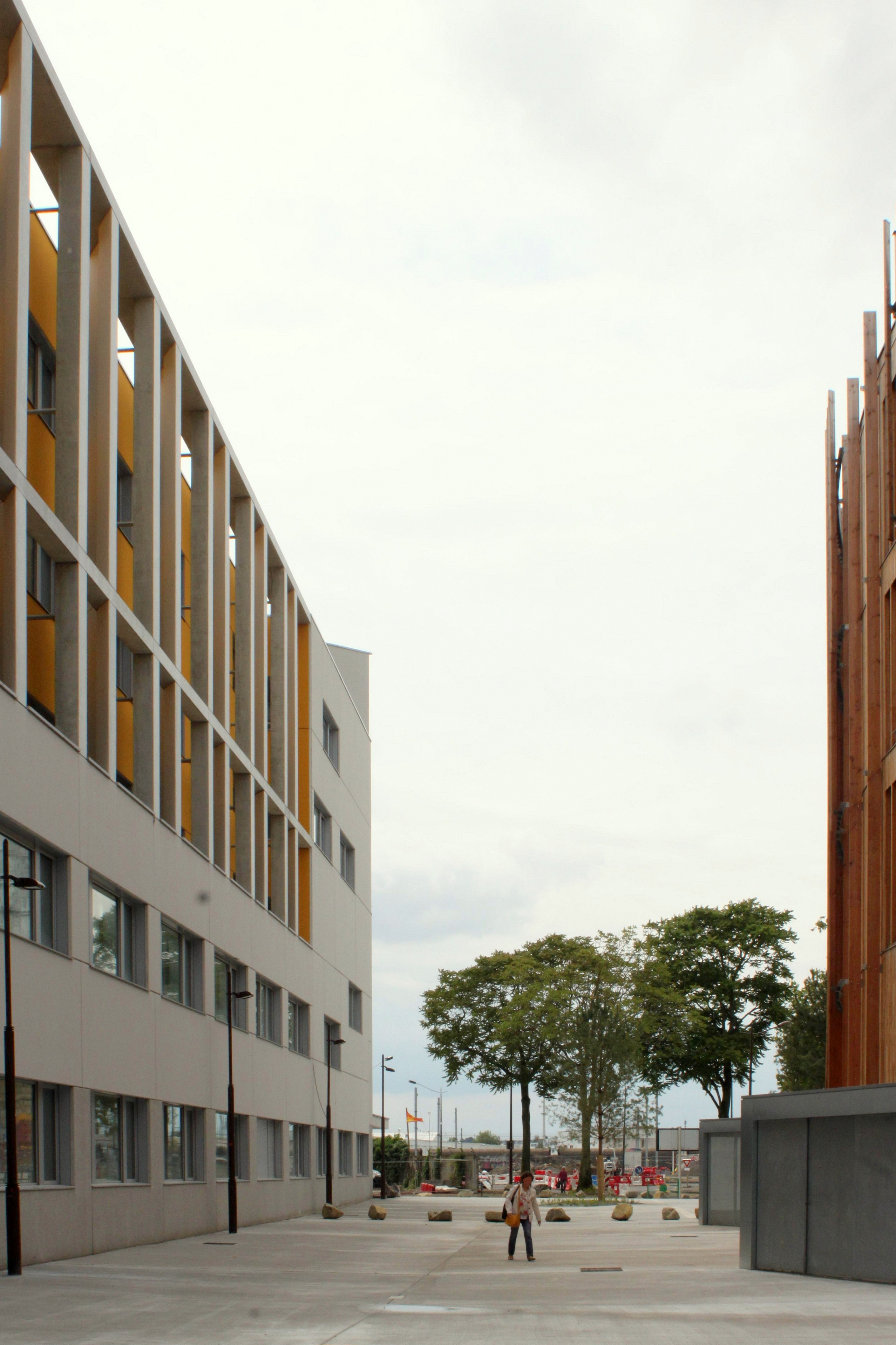 Place Albert-Camus, Fr-44-Nantes.